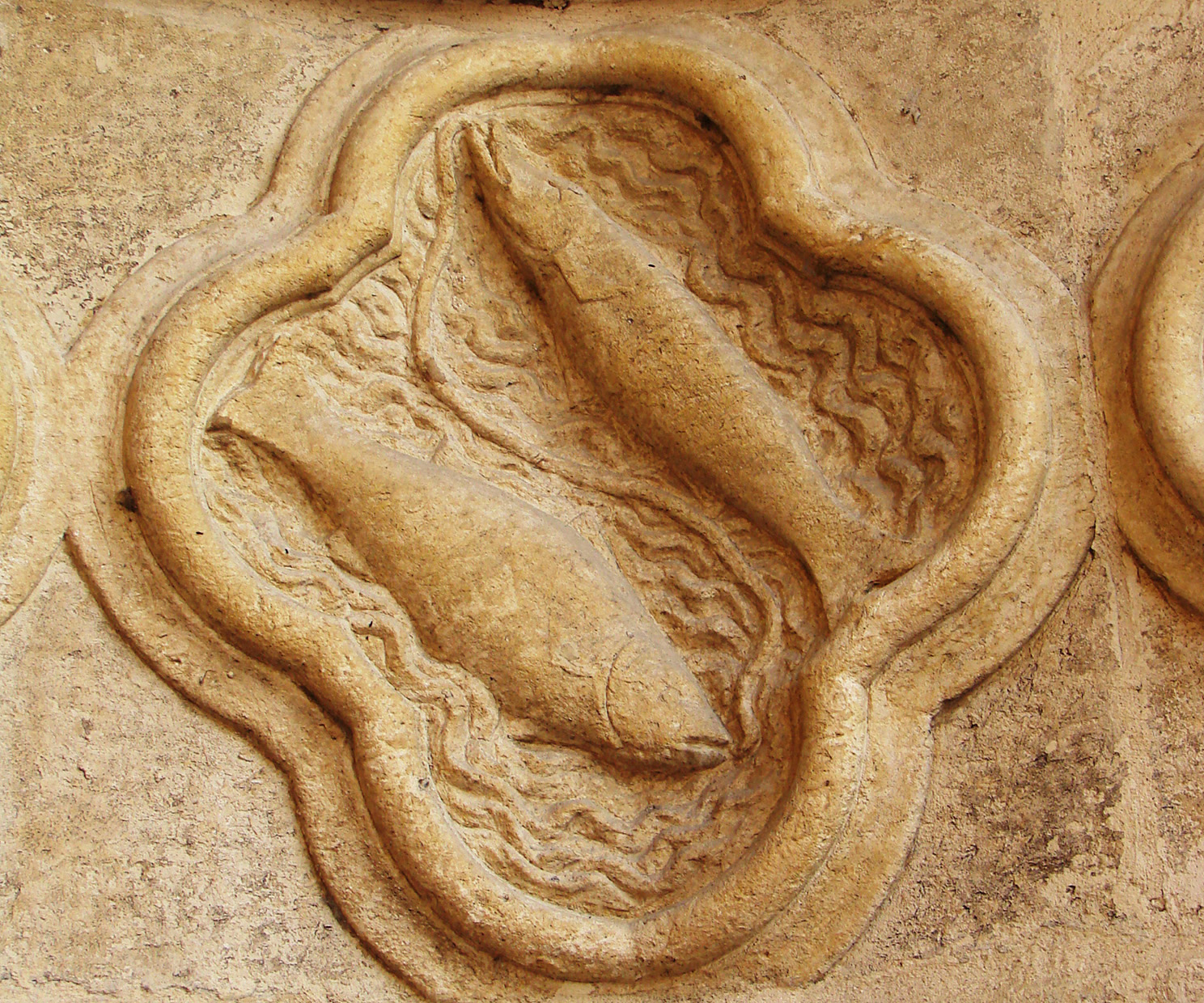 Les poissons (Pisces) ;un des signes du zodiaque complet figurant sur le portail gauche de la façade de la cathédrale d'Amiens.